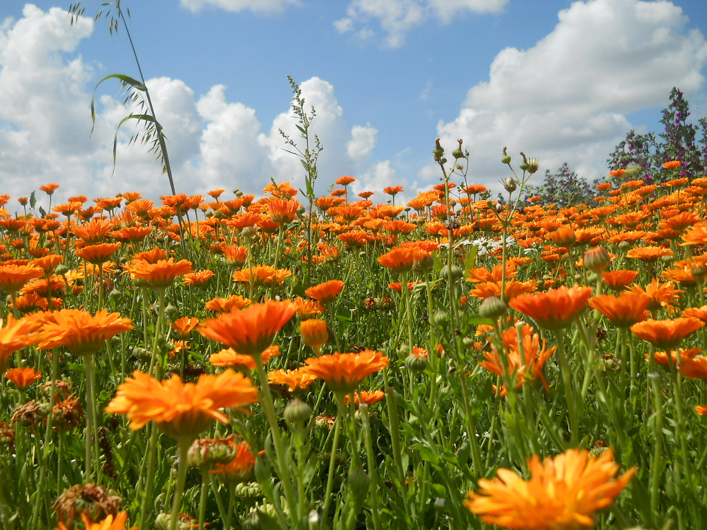 Plantacja nagietka lekarskiego